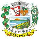 Brasão da cidade de Mesópolis, SP